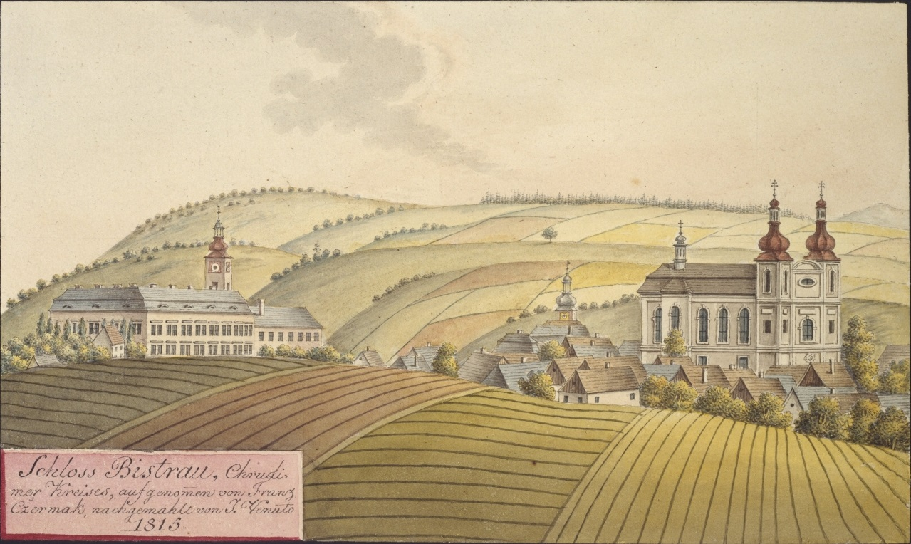 Bystré (okres Svitavy). Schloss Bistrau, Chrudimer Kreises, aufgenommen von Franz Czermak, nachgemahlt von J. Venuto